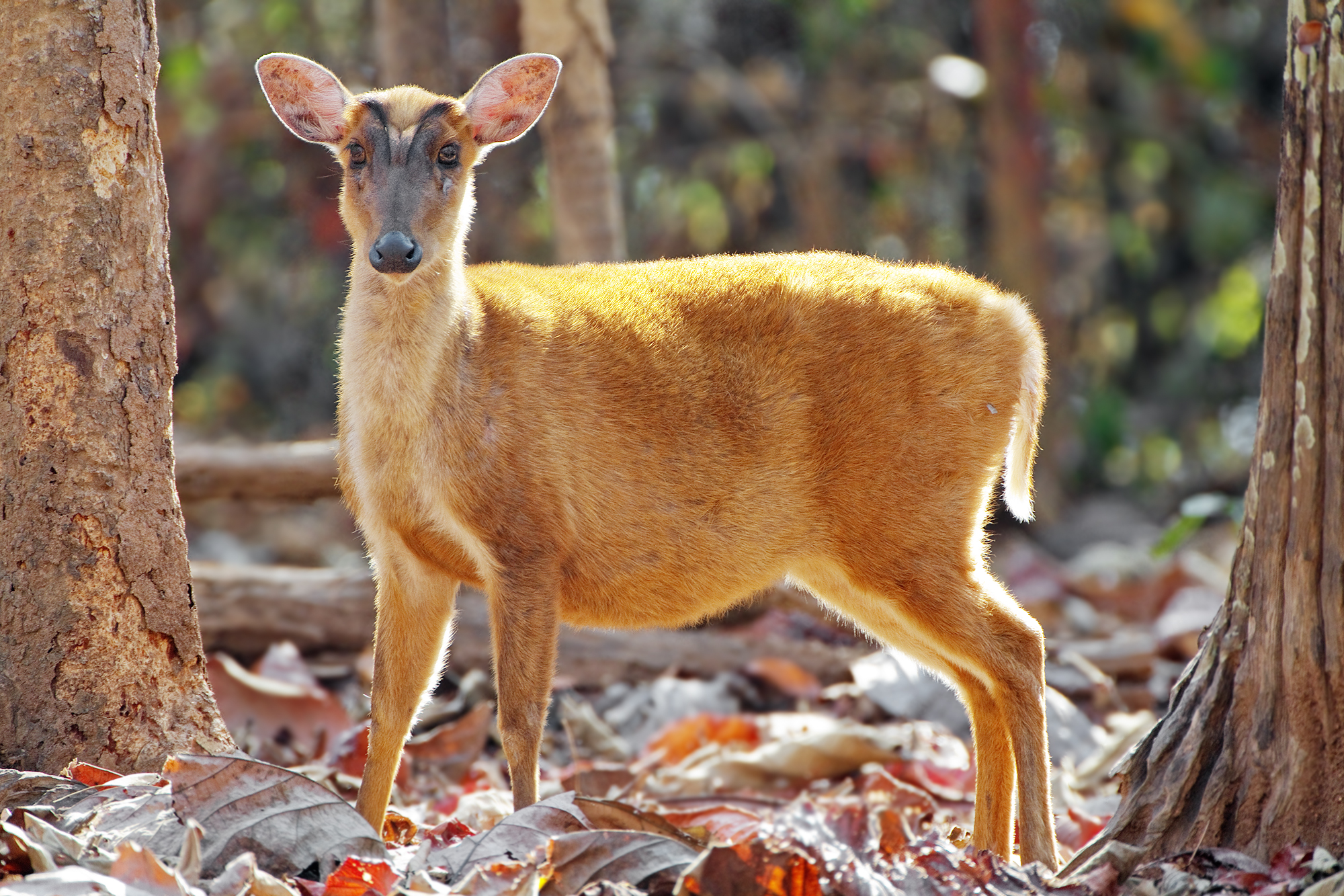 Barking Deer (Muntiacus muntjak), Hai Hong Karni, Thailand